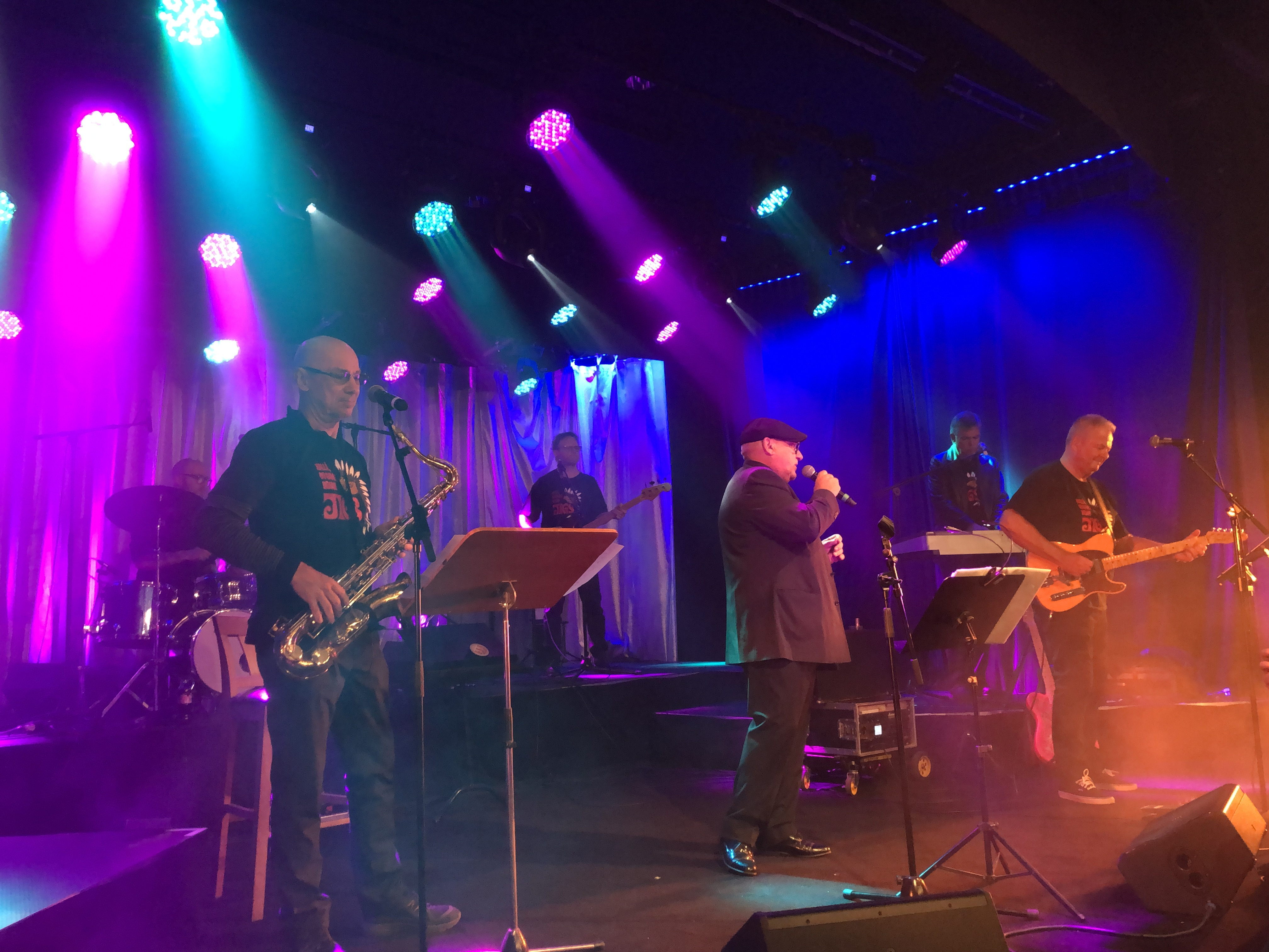 Jigs spelar live i Trollhättan, 2019. Foto: Johan Rosén